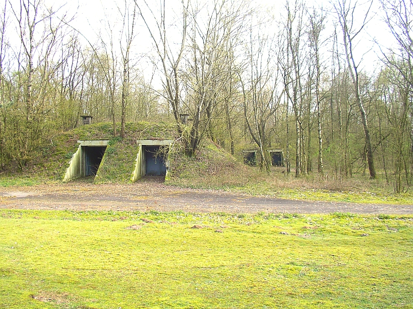 Ehemalige Munitionsbunker auf dem Standortübungsplatz (Die Berge), Kreis Borken